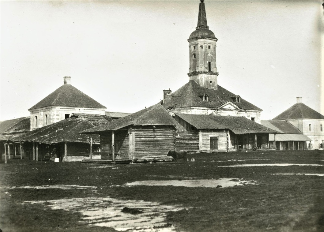 Беларуская (тарашкевіца): Шклоў (Škłoŭ), пляц Рынак (plac Rynak). Ратуша